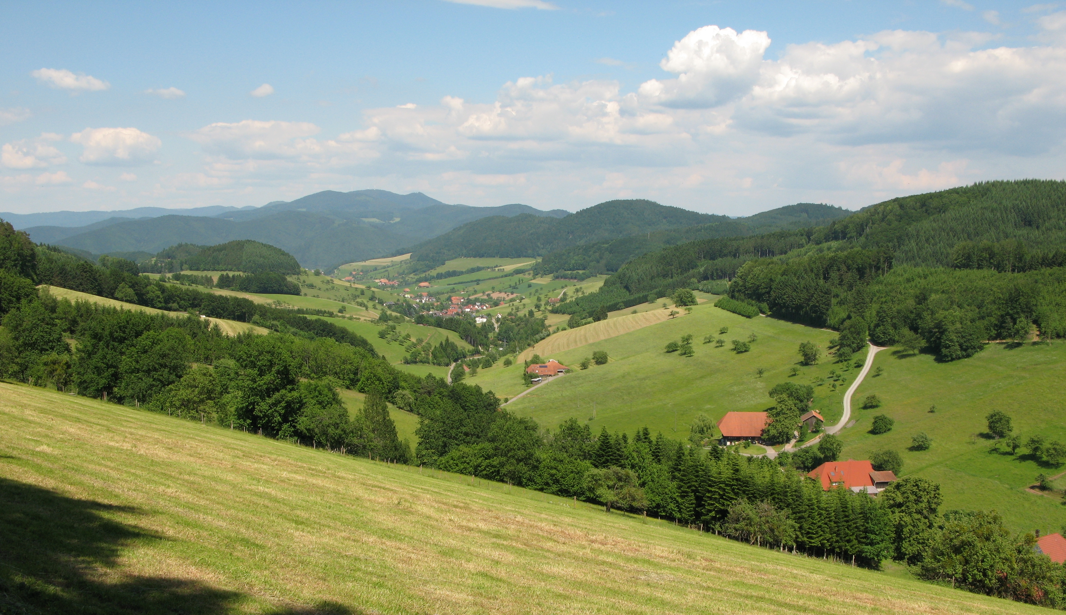 Blick nach Welschensteinach von einem Höhenrücken zwischen dem Schuttertal und dem Kinzigtal am Kandelhöhenweg und dem Schwarzwald-Querweg Rottweil–Lahr im Schwarzwald.